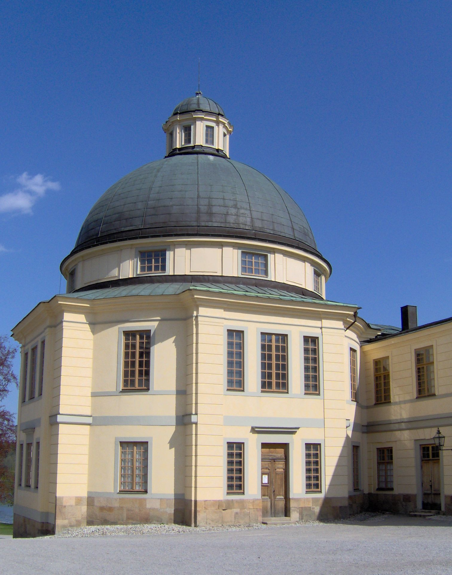 Drottningholmsslottskyrka, Drottningholm, Stockholm Drottningholms castlechurch, Drottningholm, Stockholm, Sweden.